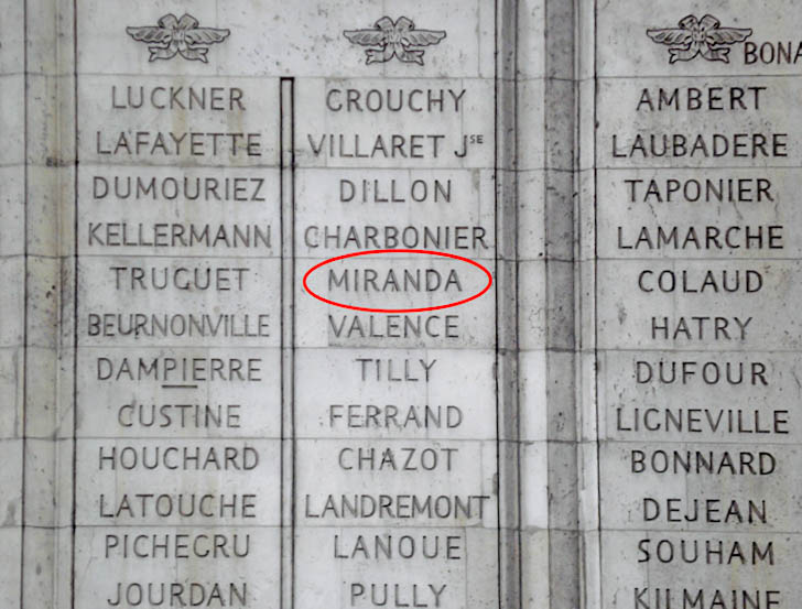 Miranda Grabado en un muro interior del Arc de Triomphe de París